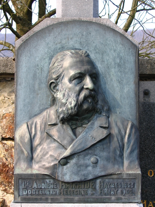 portrait en fonte bronzée de Louis Adolphe Hamaide médecin à Haybes (Ardennes) apposé sur sa tombe